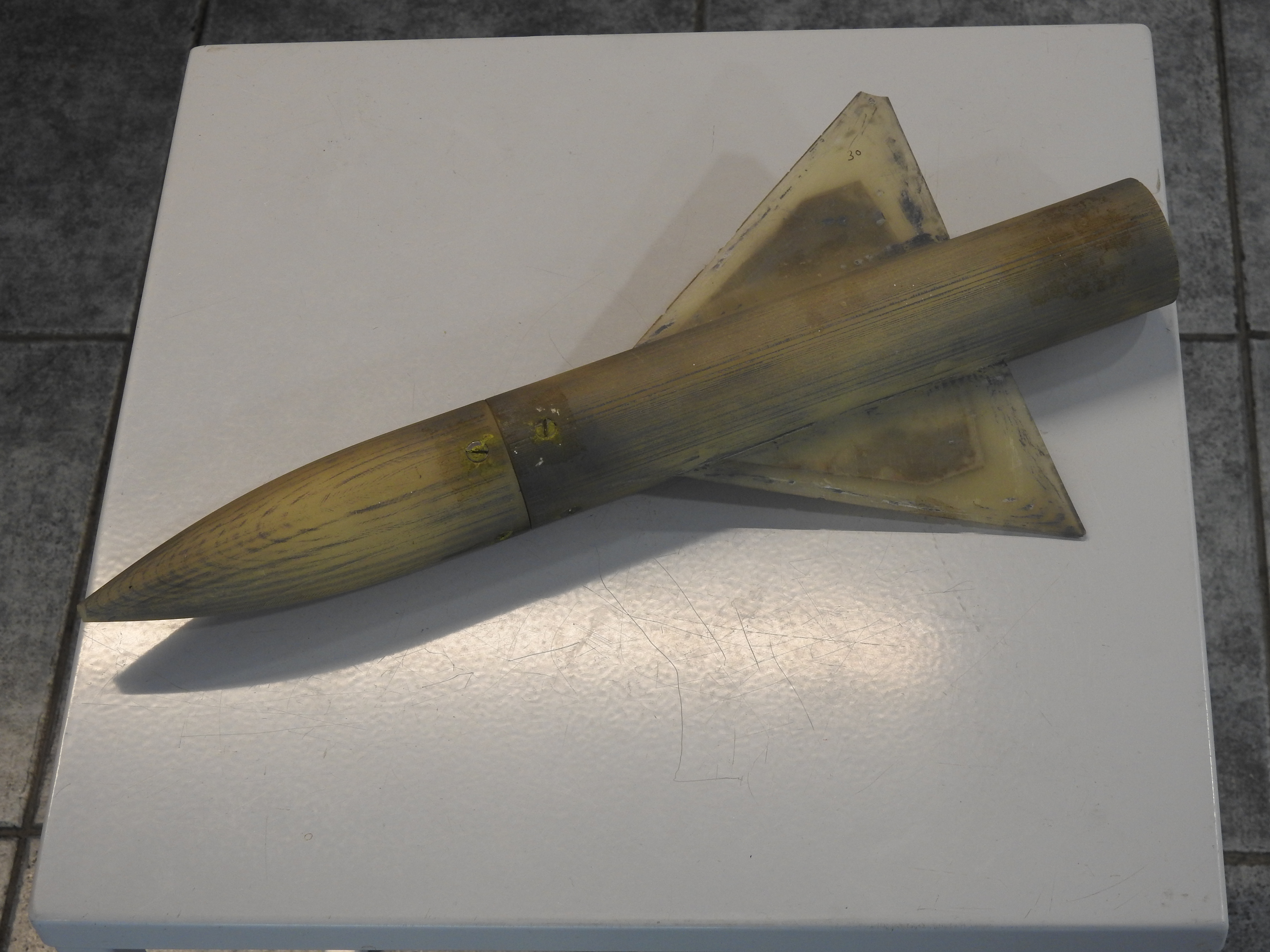 דגם טיל שבכנפיו מושתלים תוך כדי הבניה להבי פלדה לניסוי במנהרת רוח